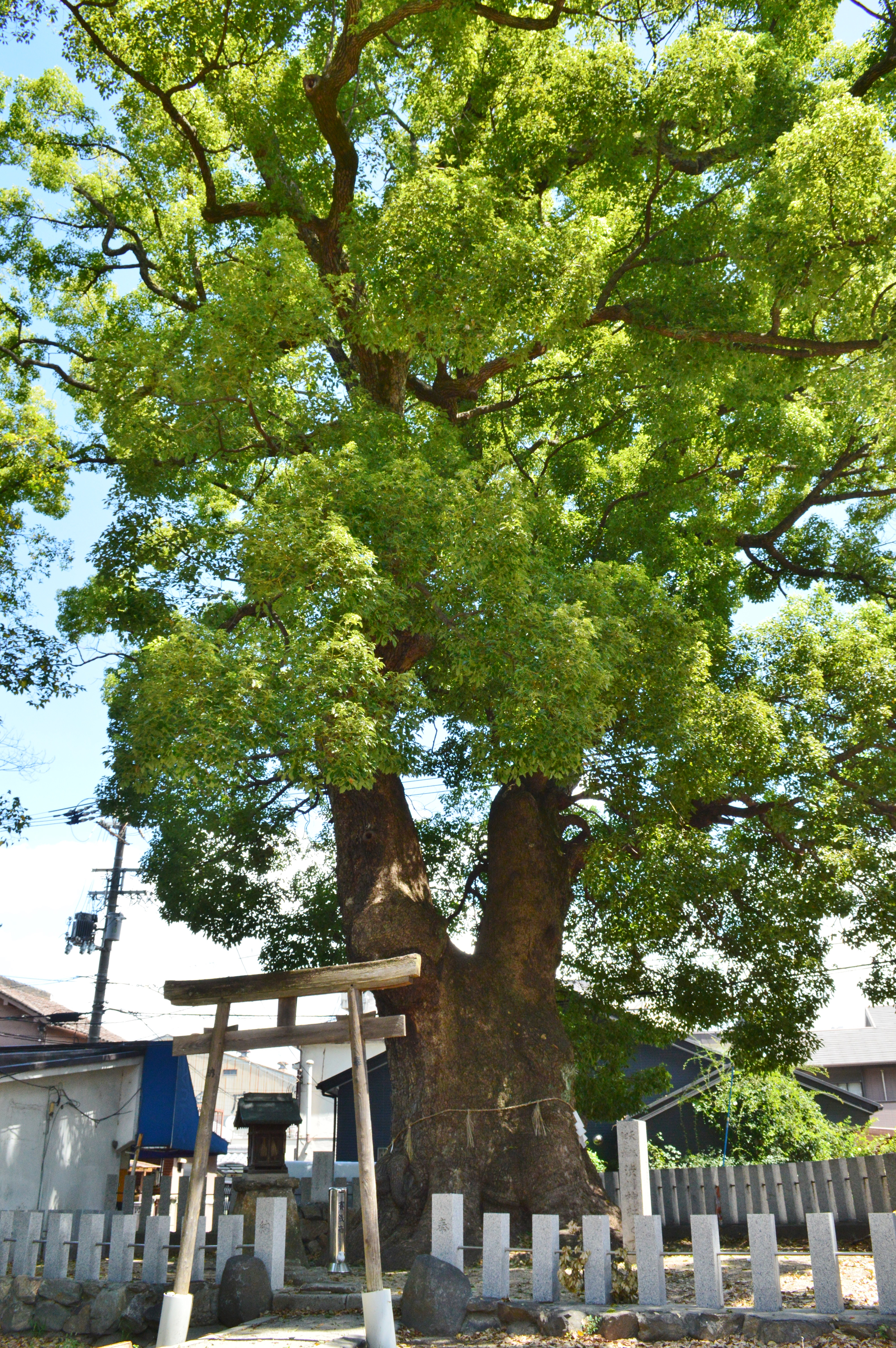 渋川神社 (八尾市) 大クス